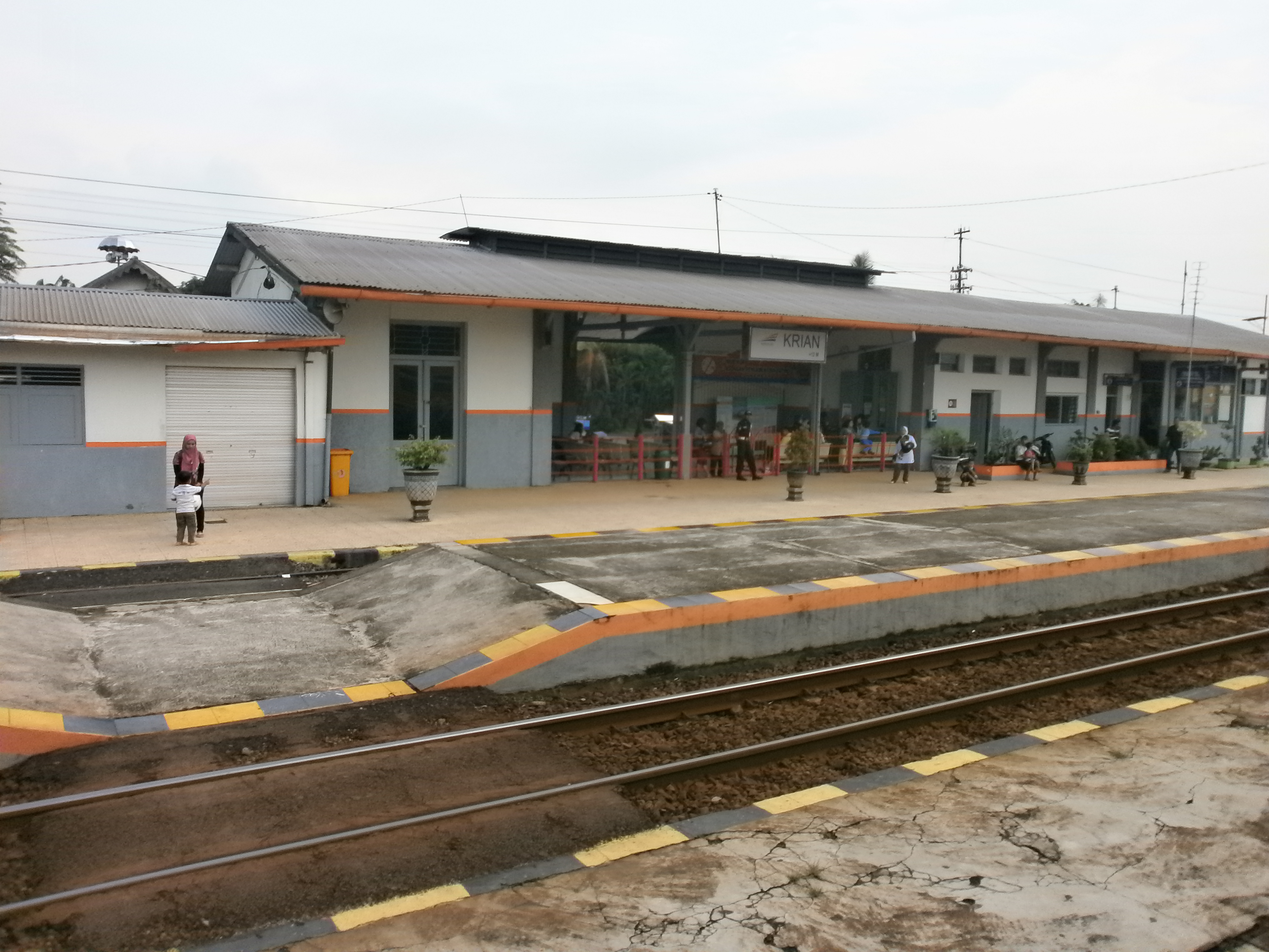 Stasiun kereta api Krian dilihat dari kereta api Dhoho Penataran, diunggah dari koleksi pribadi